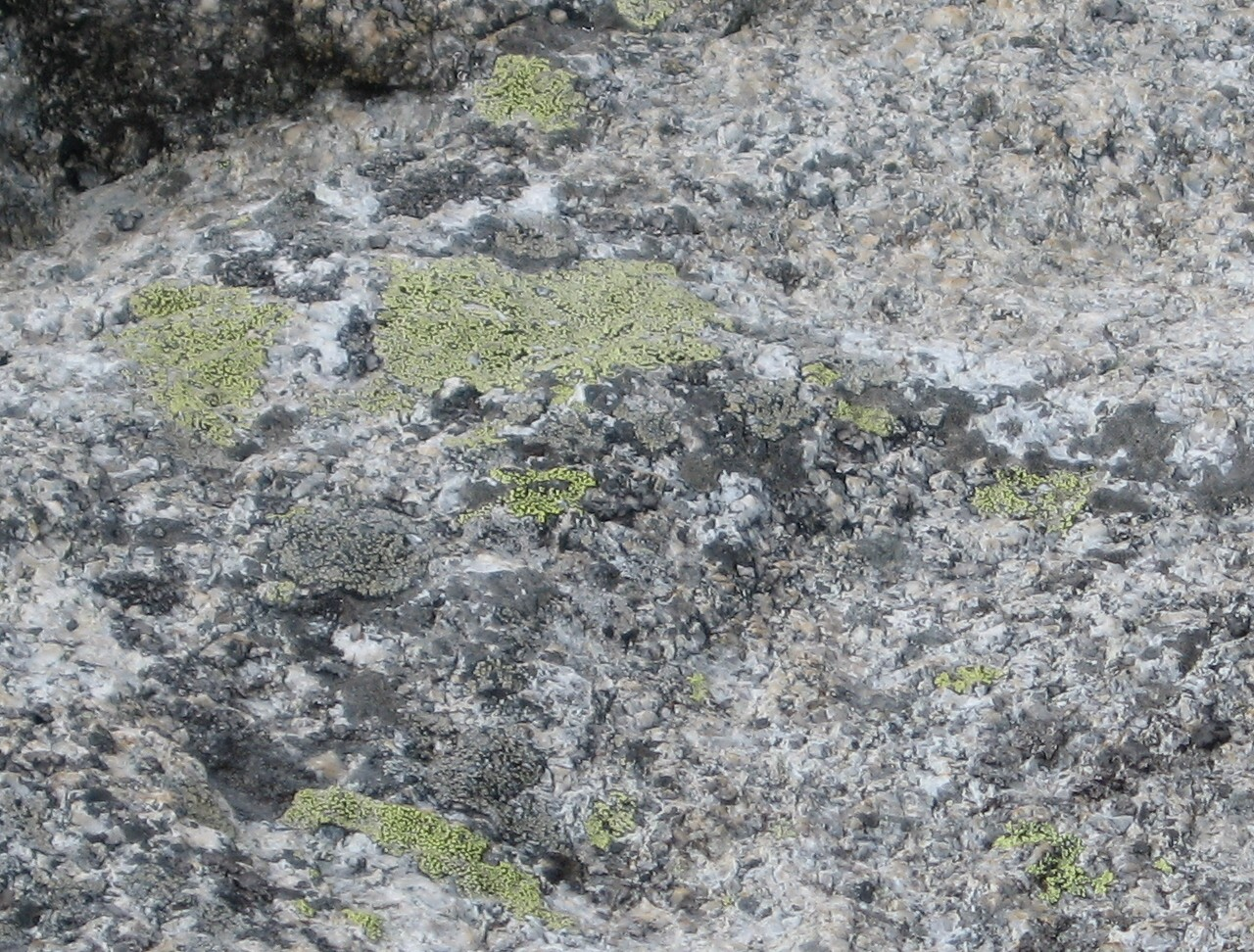 map lichen